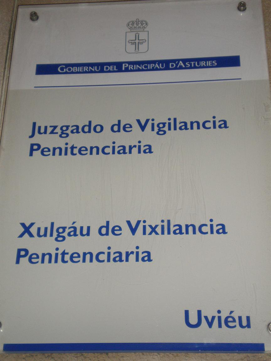 xuridic signboard bilingual Castilian-Asturian